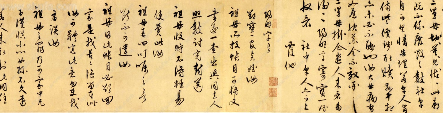 [明] 王守仁《与郑邦瑞尺牍》 纸本，行草。 纵24厘米，横392.8厘米。 墨 来自：中国书法网 原作为二维平面艺术（书法作品），作者逝世已逾百年，无特殊版权要求。